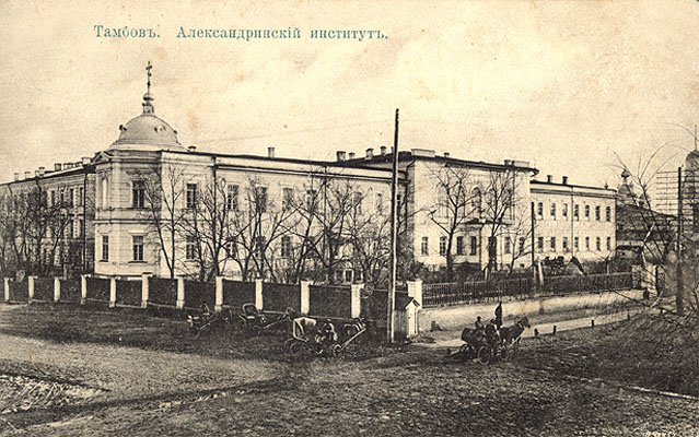 Тамбов. Александринский институт Сейчас корпус ТГУ им. Г.Р. Державина